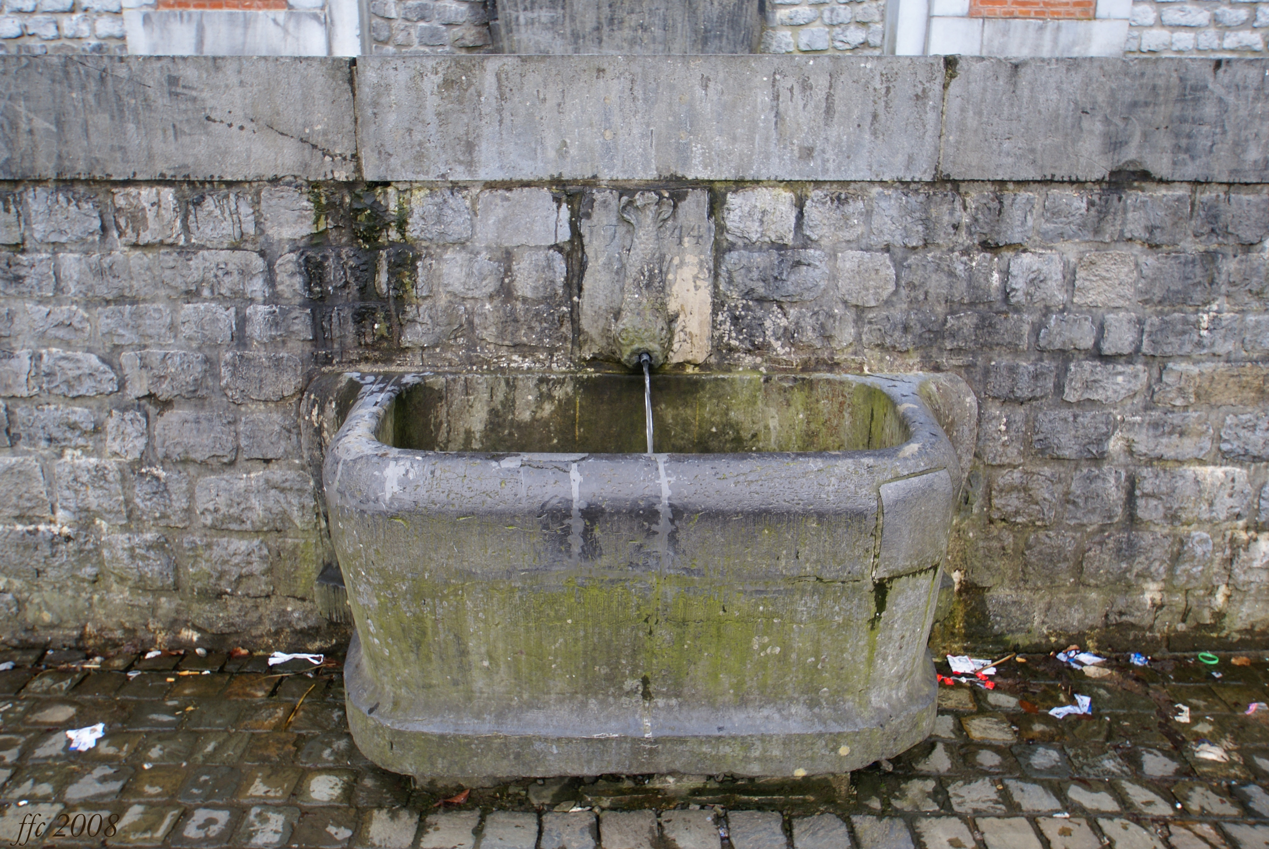 Chaudfontaine (Belgium) Les Belles Fontaines (1744-1747) Fount (detail) Font (detall) Fontaine (détail) Fontein (detail)